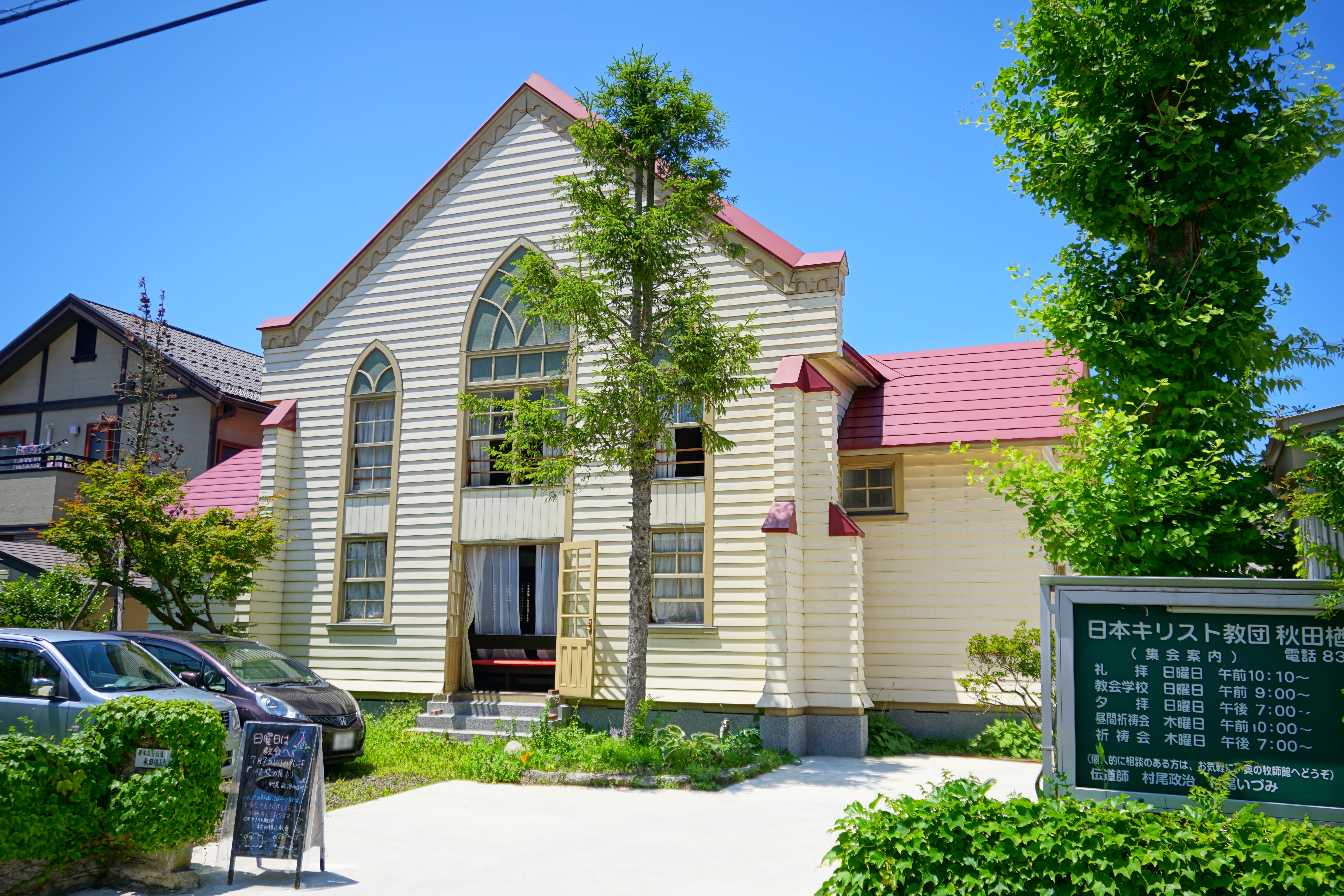 日本基督教団 秋田楢山教会